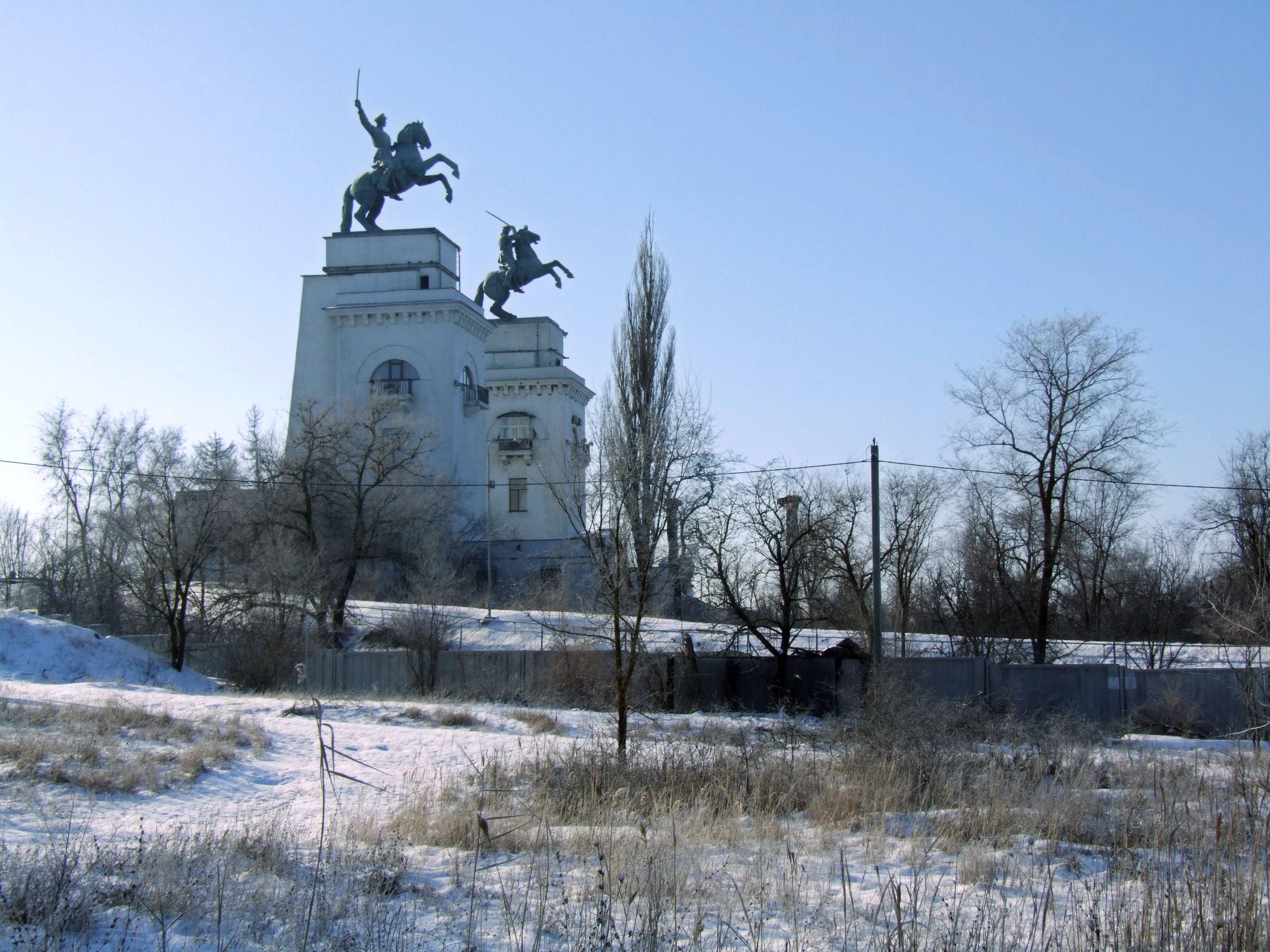 Volgodonsk, Rostov Oblast, Russia